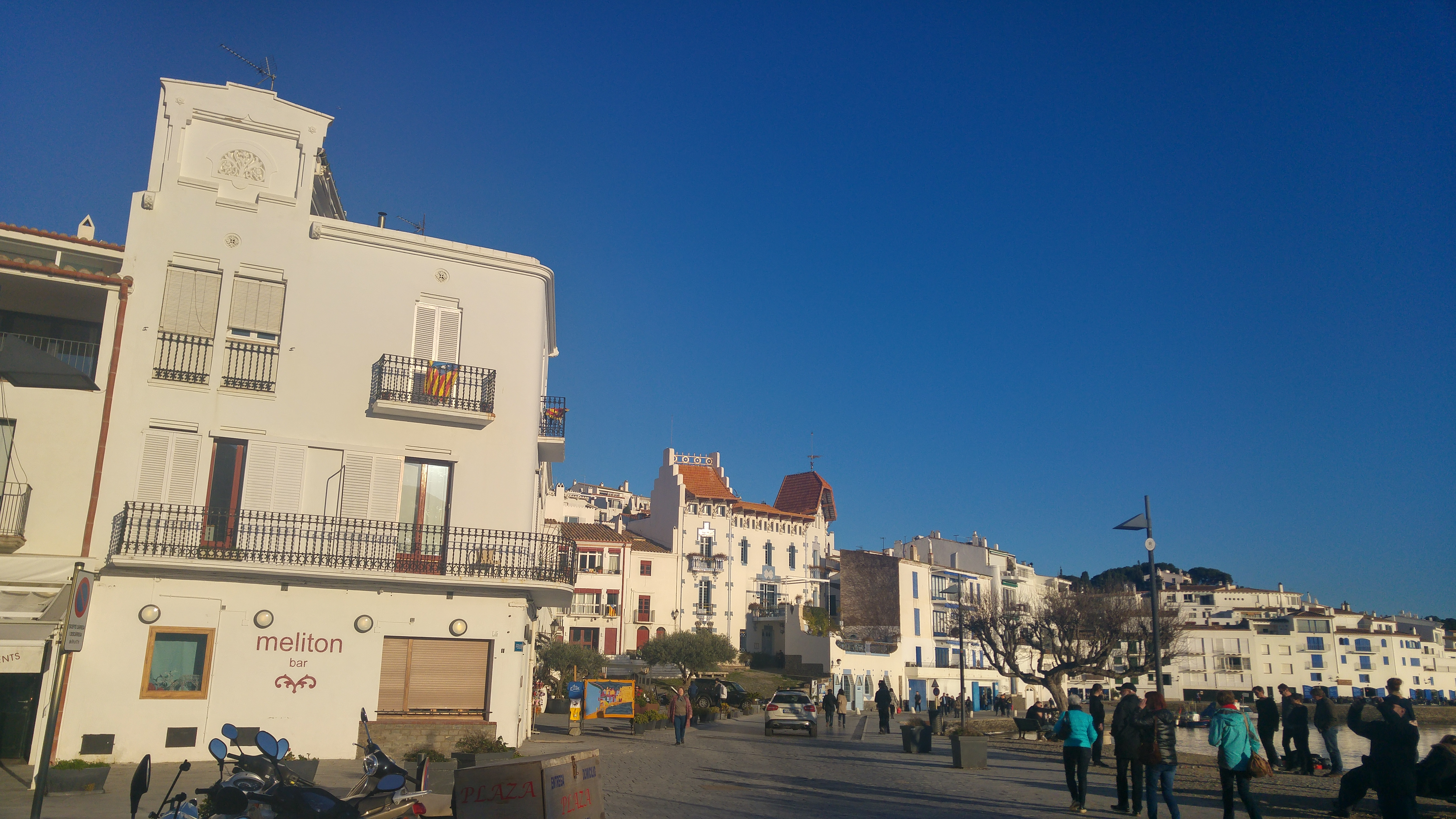 Can Meliton, casa de Cadaqués de principis del segle XIX que fou un antic hotel.